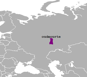 Localisation de l'oudmourte.